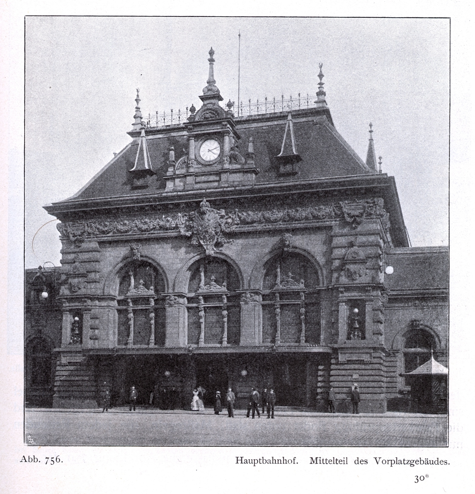 Alter Hauptbahnhof in Düsseldorf, eröffnet im Jahre 1891, abgebrochen im Jahre 1932,_Mittelteil_des_Vorplatzgebäudes.jpg